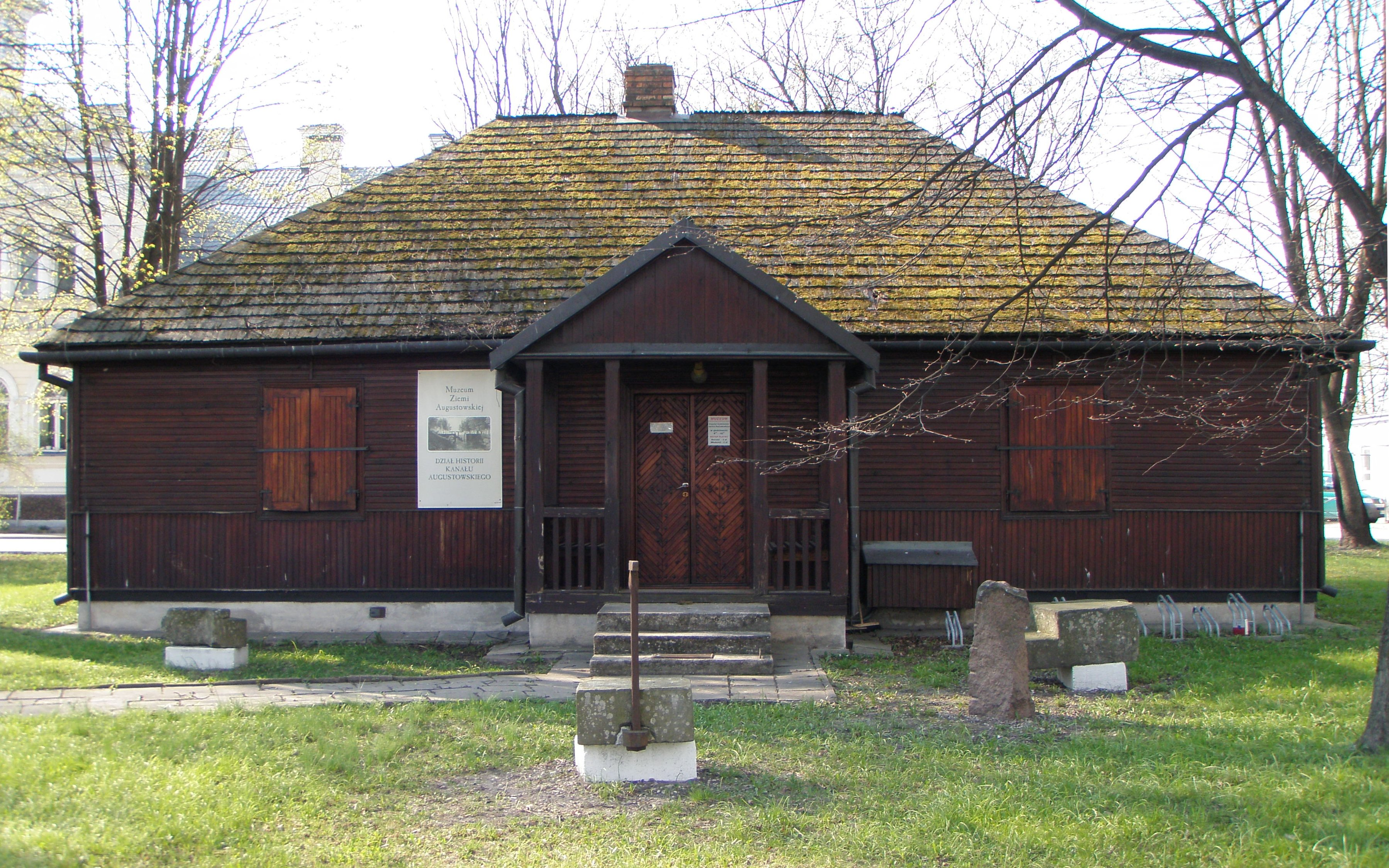 Dział Historii Kanału Augustowskiego (Muzeum Ziemi Augustowskiej), dawny budynek Zarządu Portu.